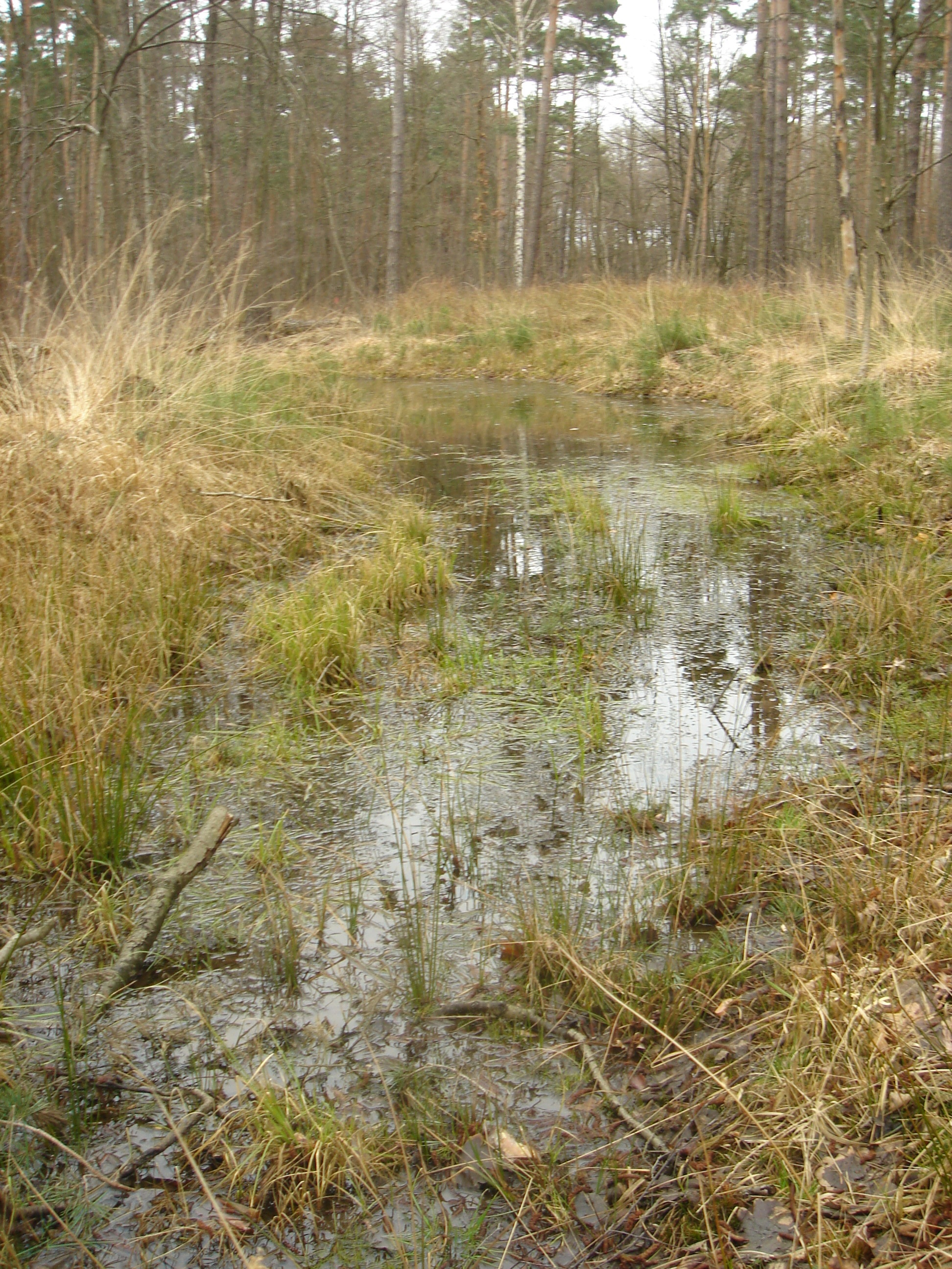 staunasse Fläche am Ruhlandgraben, Sauerbusch, Dresden